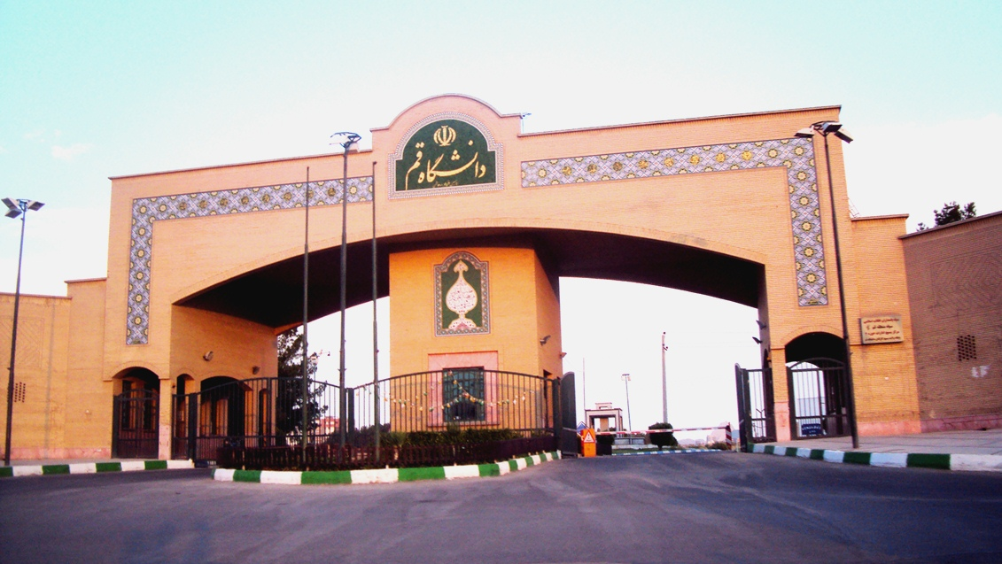 سردر دانشگاه قم